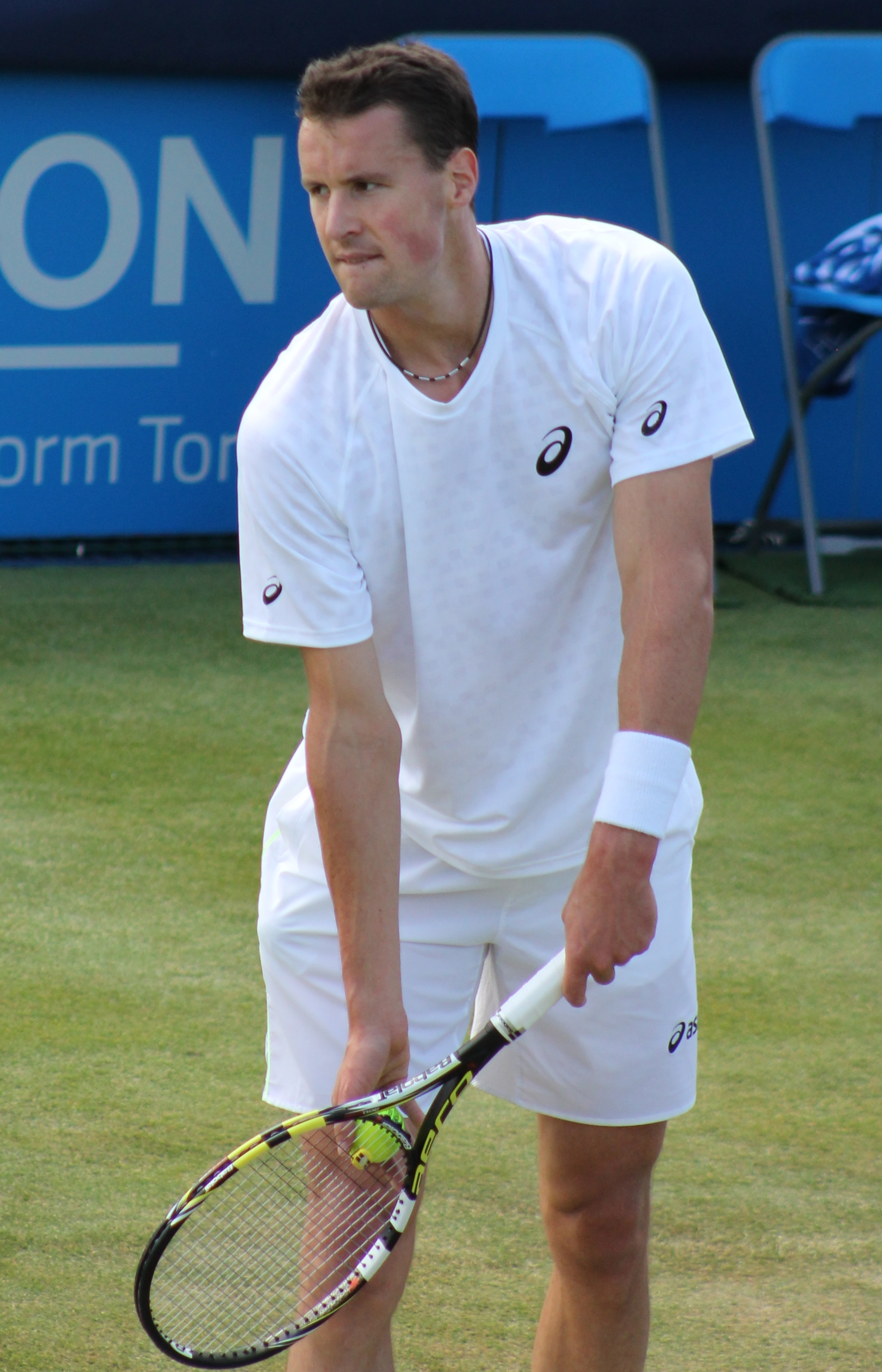 de Schepper QC13-006